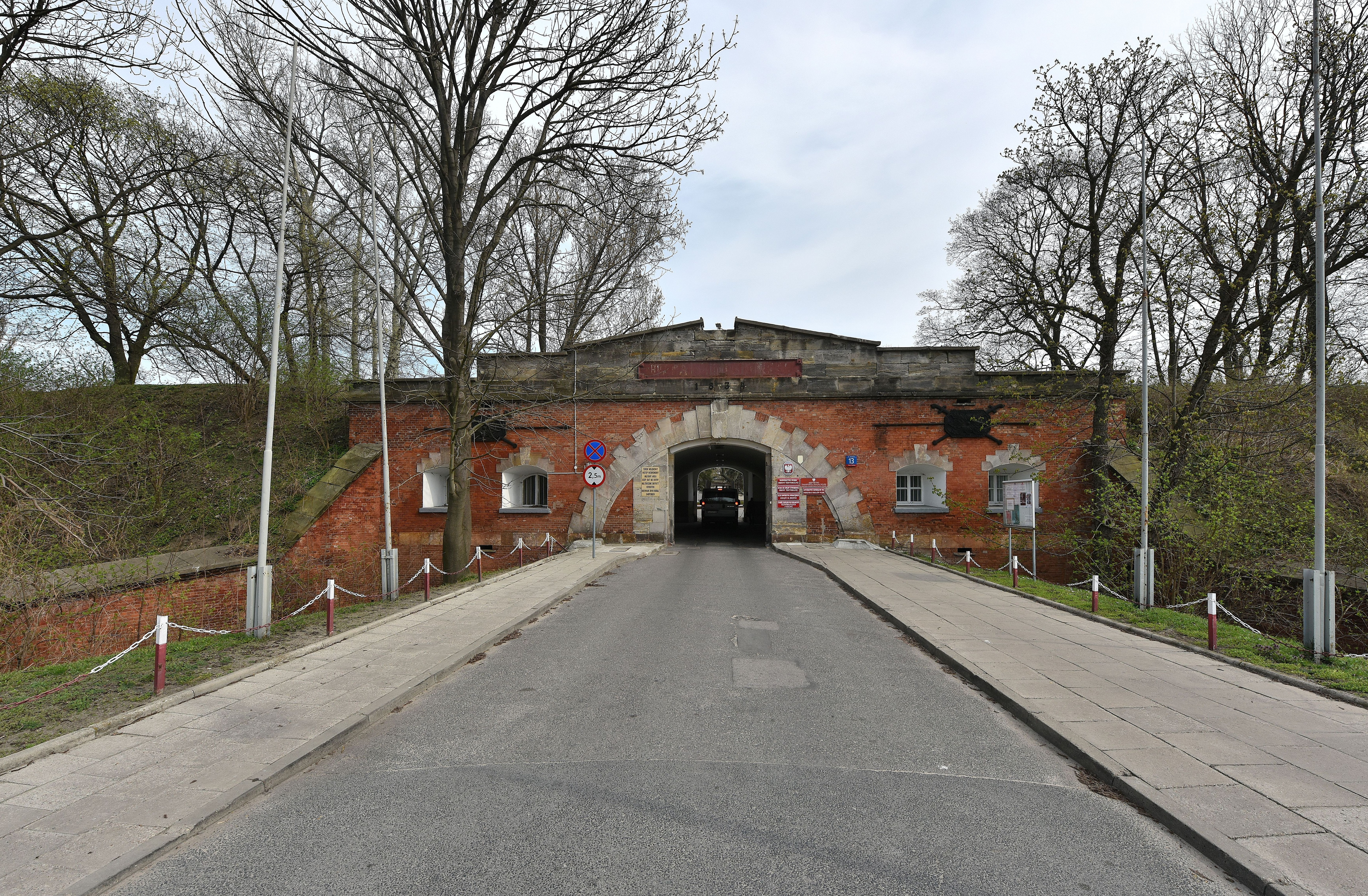 Cytadela Warszawska (m.in. Dowództwo Wojsk Obrony Terytorialnej w latach 2017-2019 )